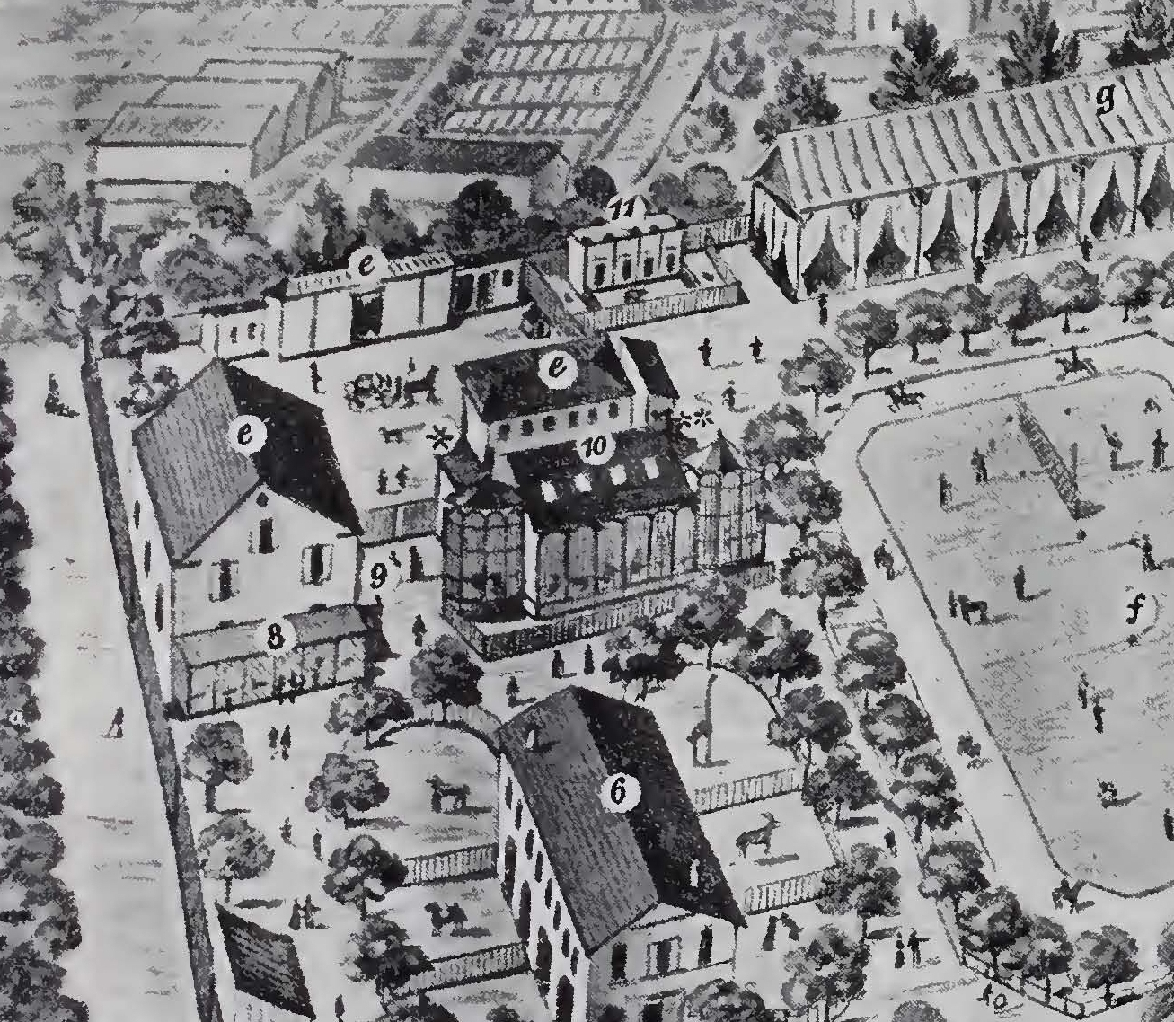 Dienstgebäude von Nills Tiergarten in Stuttgart, Ausschnitt aus einem Plan des Tiergartens, 1905. Kennzeichen: e = Dienstgebäude, f = Völkerwiese, g = Zelt.